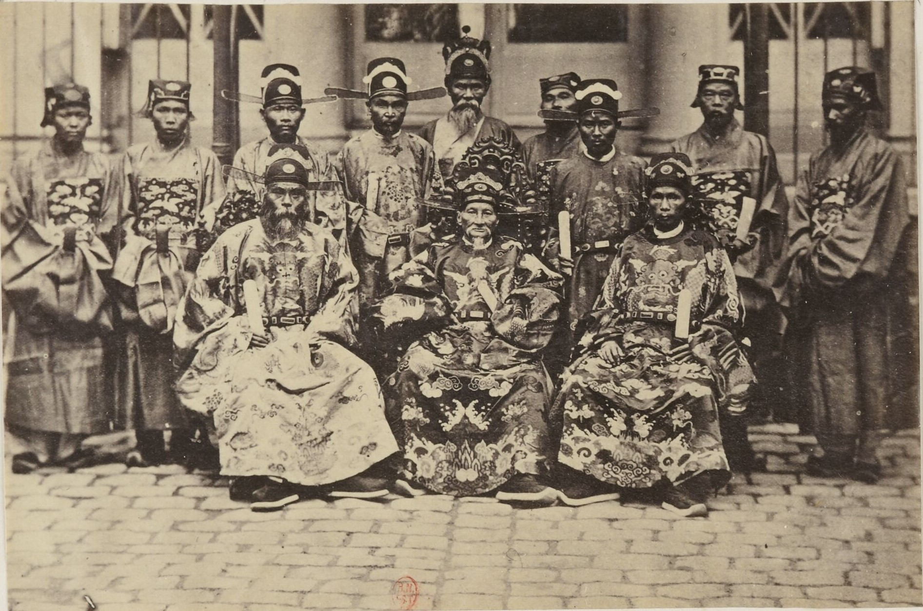 Phái đoàn nhà Nguyễn do Kinh lược sứ Nam kỳ Phan Thanh Giản sang thăm Pháp.